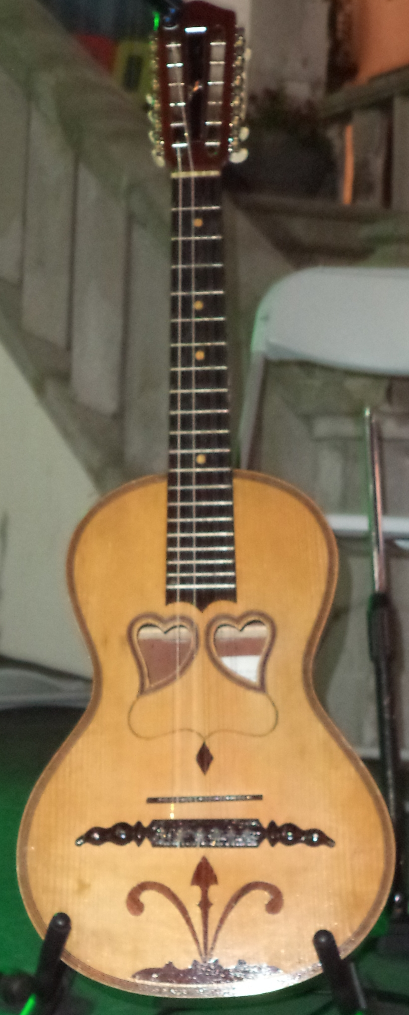 Atuação da Escola de Violas da Relva, na Praça do Município, Ponta Delgada, São Miguel, Açores, Portugal, no dia 26 de julho de 2014.